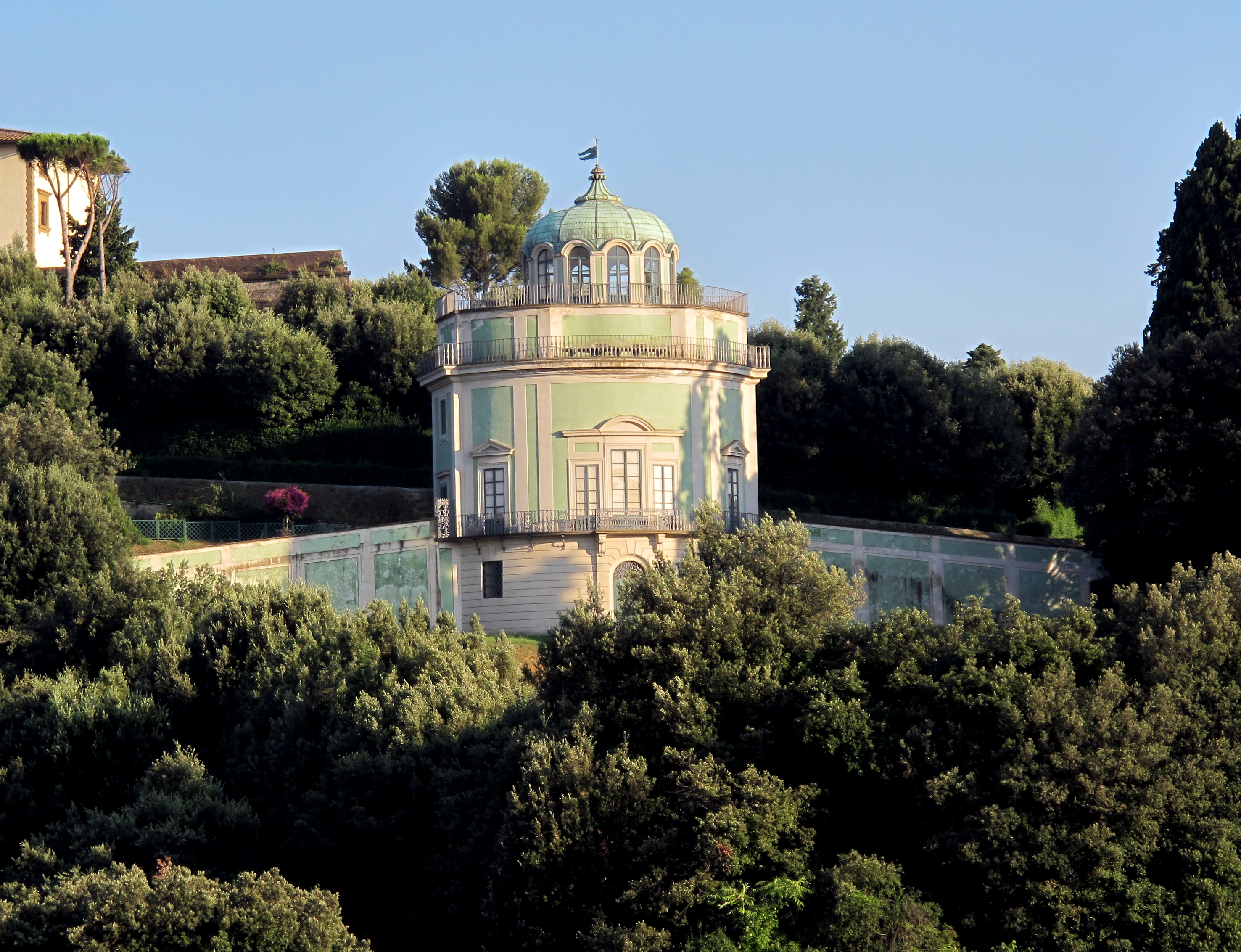 Hotel la scaletta, terrazza, veduta, kaffeehaus